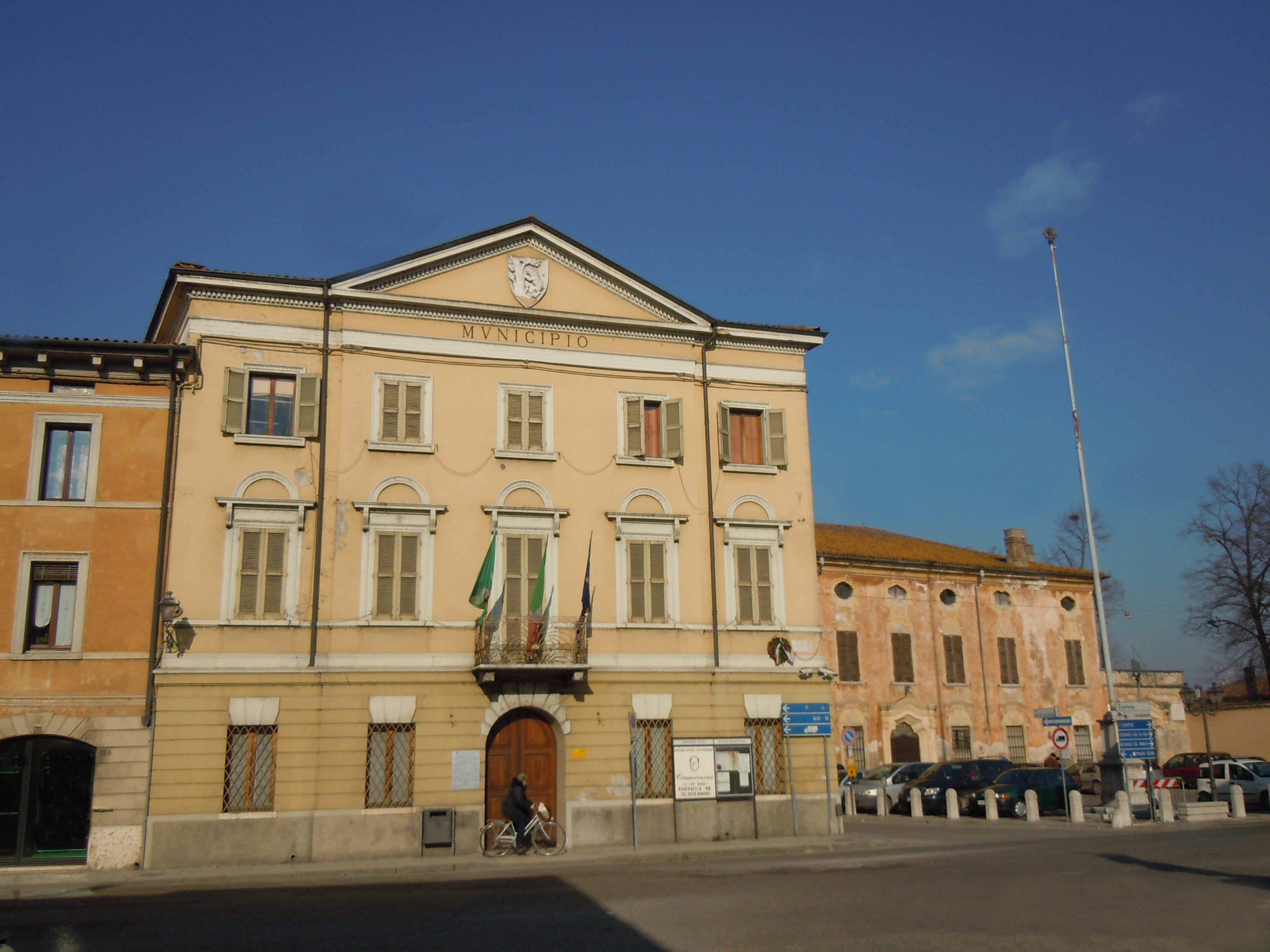 Roverbella, il municipio